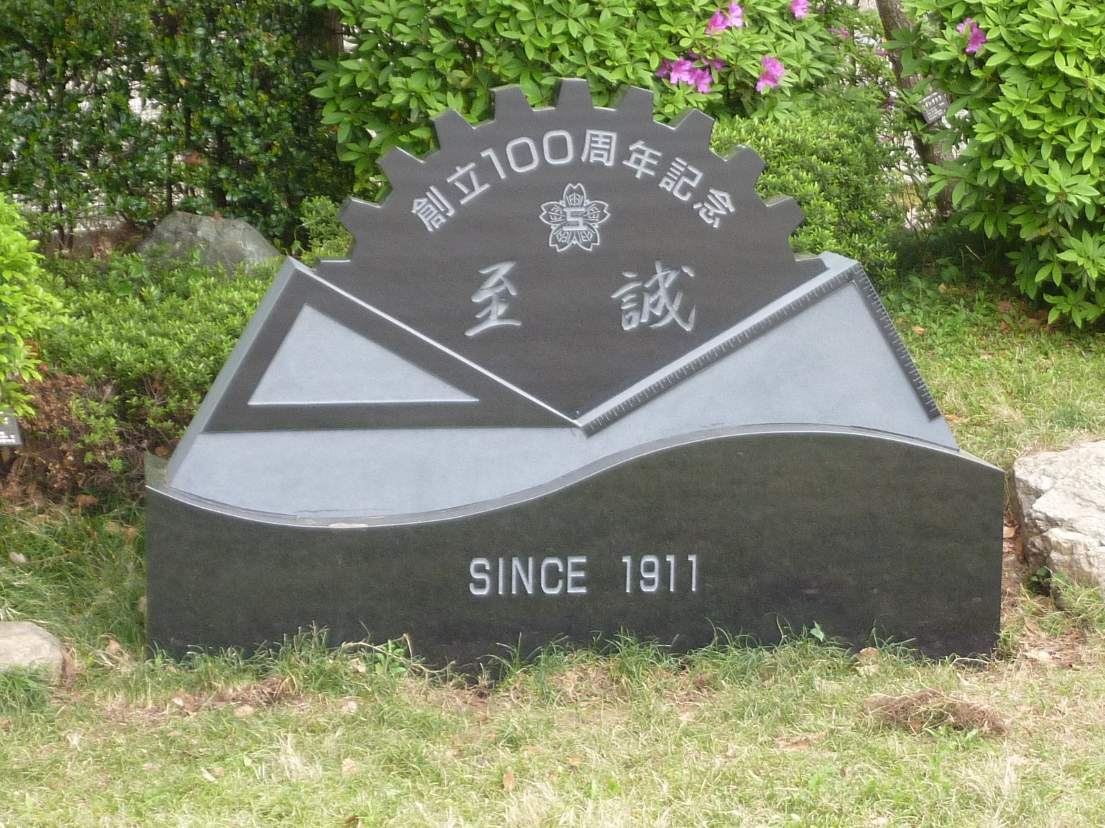 100周年記念碑